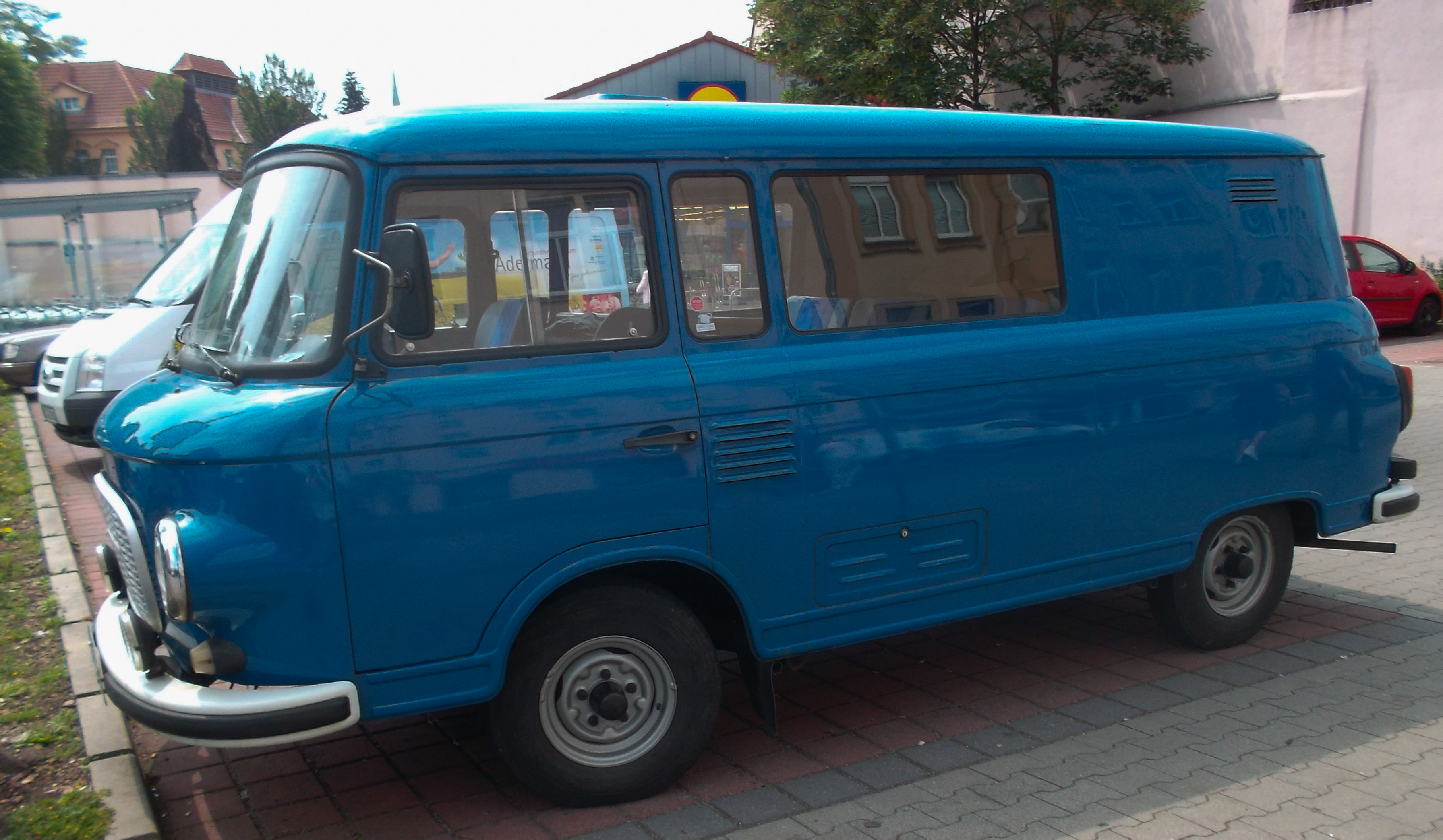 Seitenansicht Fahrerseite Barkas B 1000-1